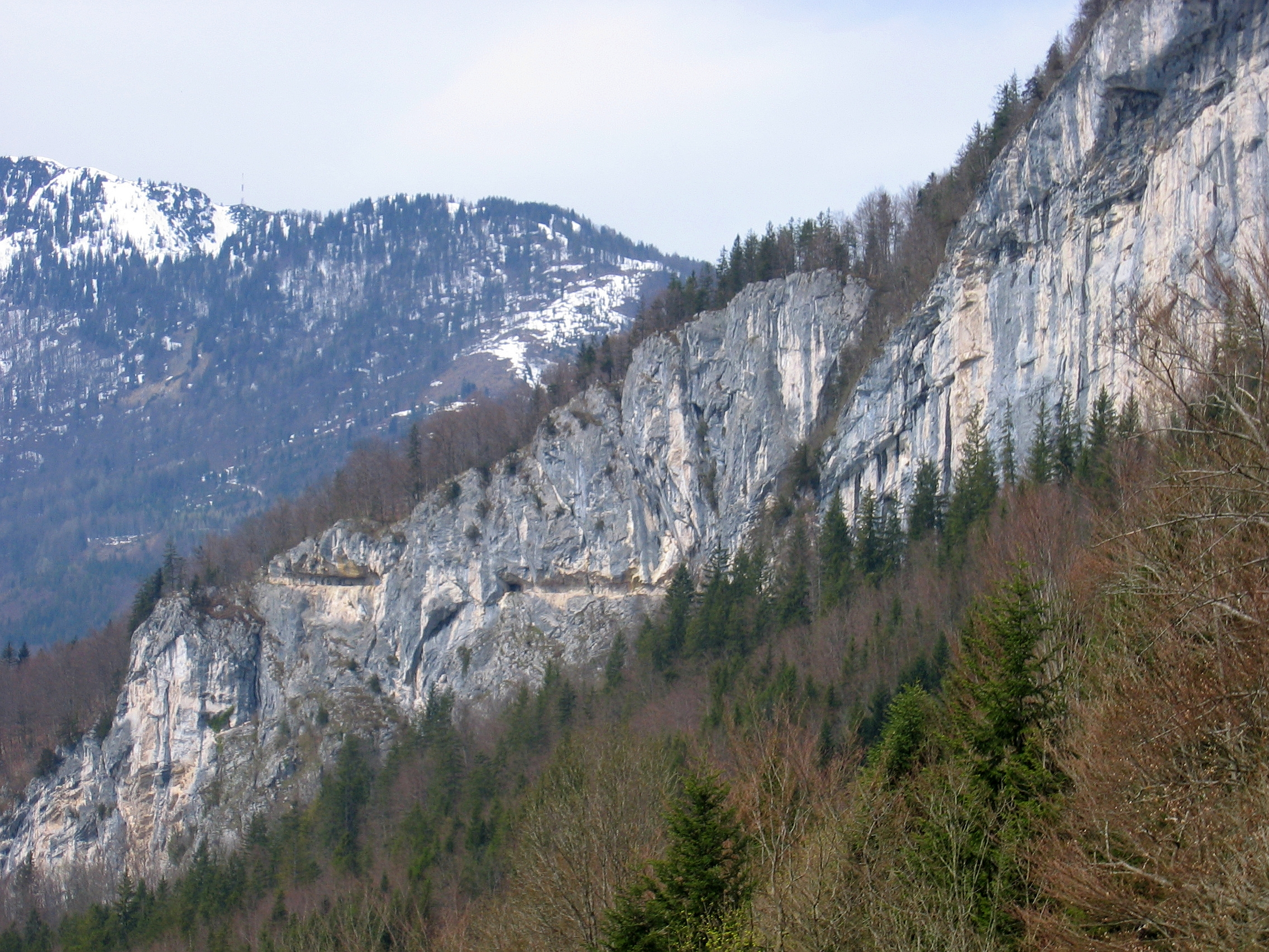 Ewige Wand Radsteig, Totes Gebirge, Österreich